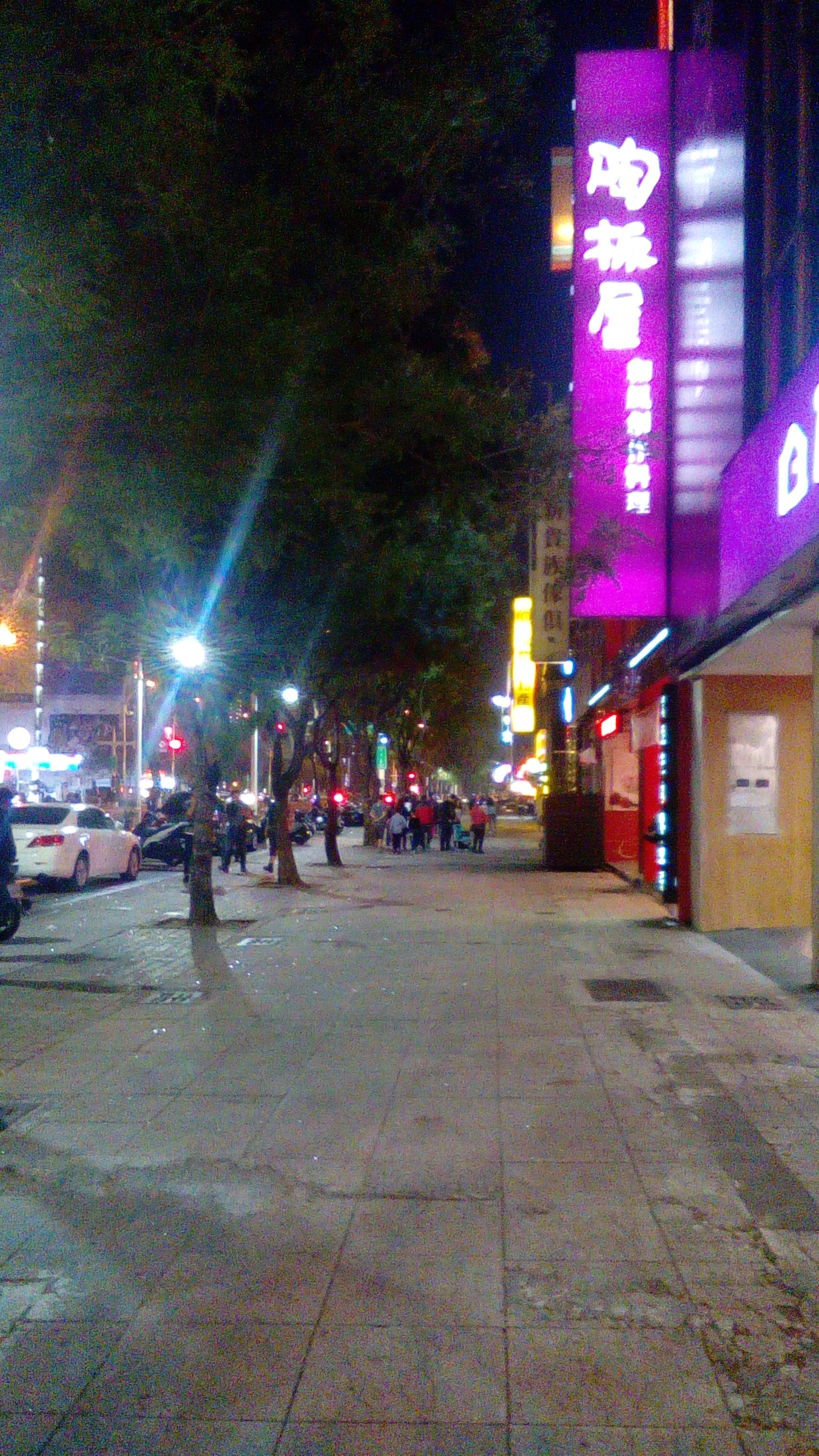 位於苓雅區中山一路與四維四路口一帶 近新興區